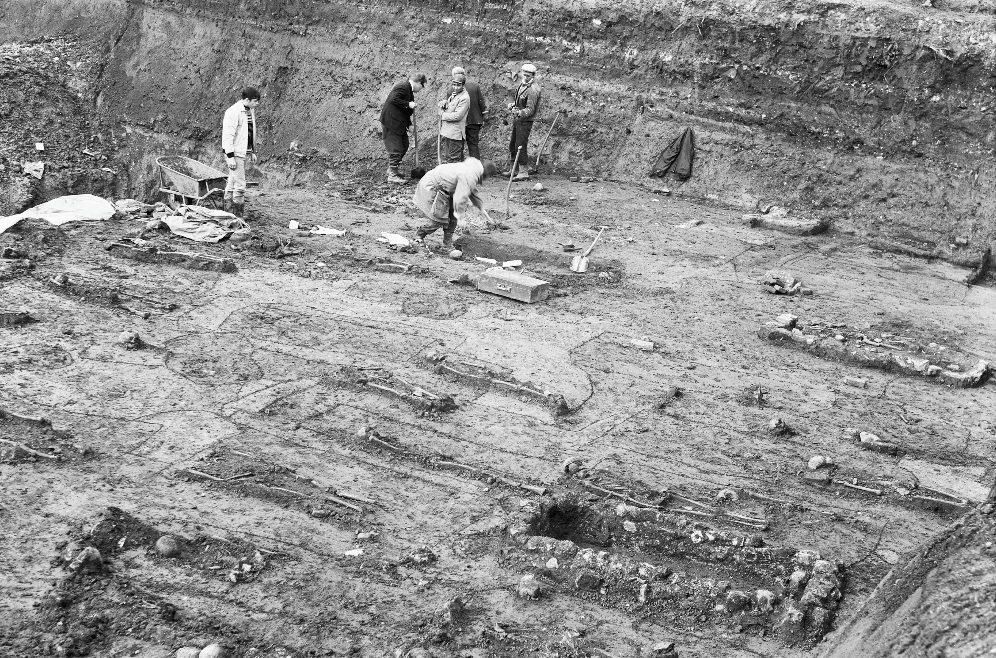 noord-zijde, naar het noorden, Merovingisch grafveld